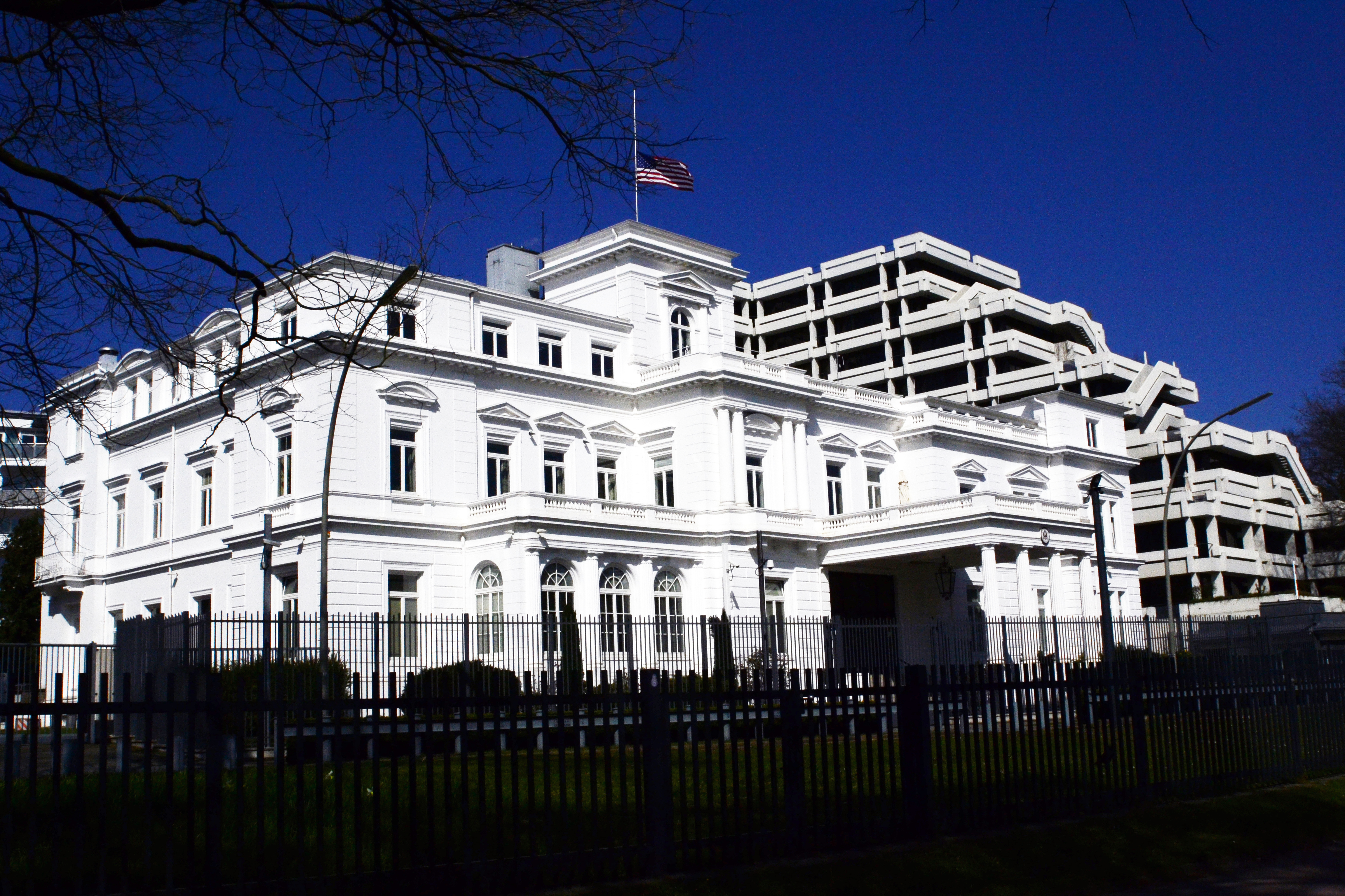 Der Amerikanische Generalkonsulat in Hamburg